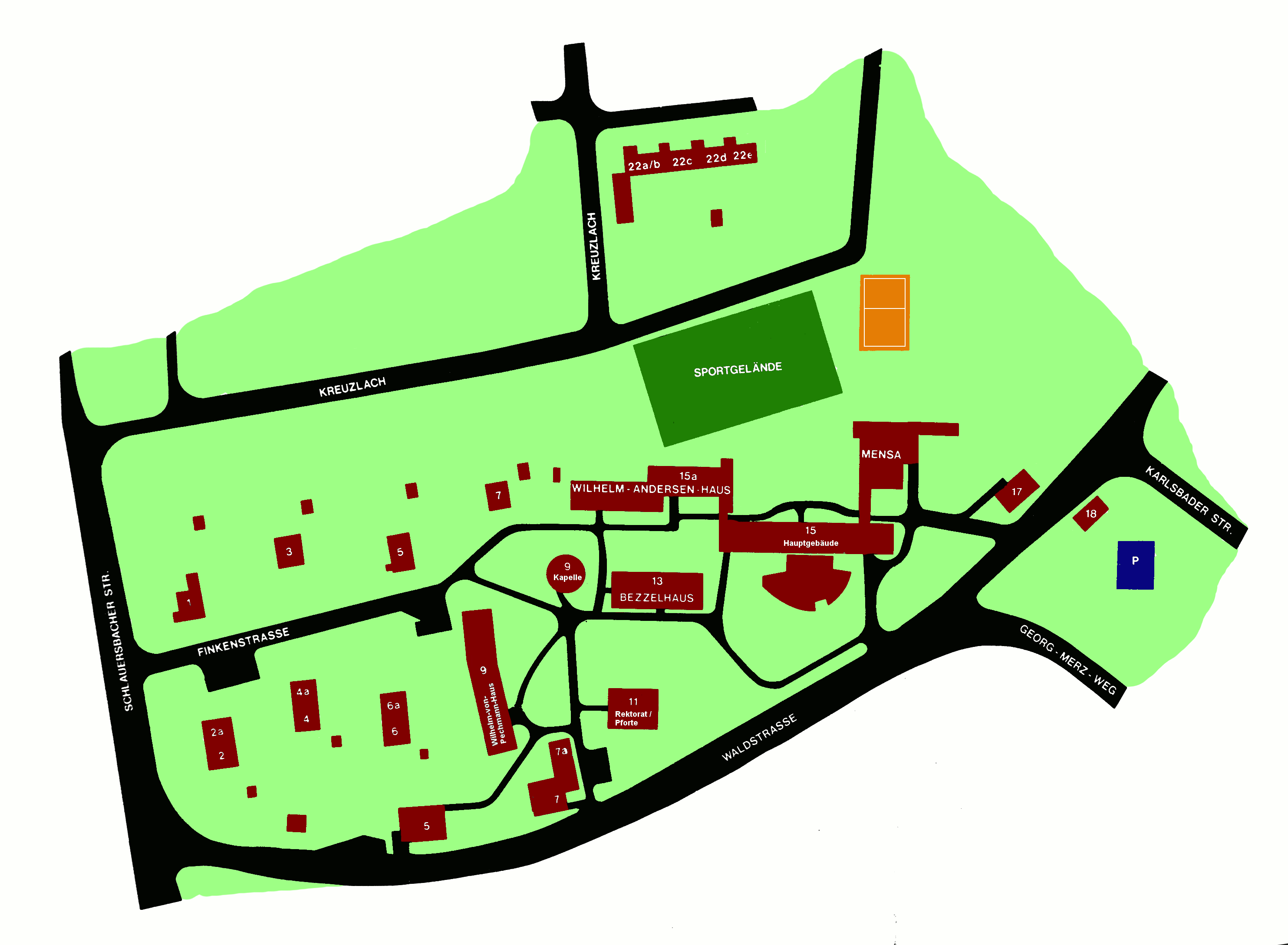 Lageplan des Campus der Augustana-Hochschule Neuendettelsau Legende: Waldstraße Nr. 5: Dorothee-Sölle-Haus Waldstraße Nr. 7/7a: Georg-Merz Haus I und II Waldstraße Nr. 9: Wilhelm-von-Pechmann-Haus Waldstraße Nr. 11: Rektorat/Pforte/Verwaltung Waldstraße Nr. 13: Bezzelhaus Waldstraße Nr. 15: Erich-Haupt-Haus/Bibliothek/Mensa Waldstraße Nr. 15a: Wilhelm-Andersen-Haus Waldstraße Nr. 17: Kommunikationszentrum Finkenstraße Nr. 1, 2/2a, 3, 4/4a, 5, 6/6a: Wohnhäuser Finkenstraße Nr. 9: Kapelle Kreuzlach Nr. 22a/b, c, d, e: Wohnhäuser